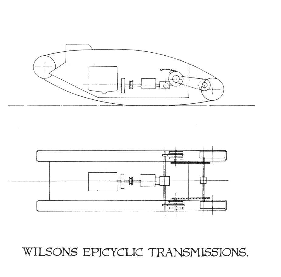 Digitale reproductie foto van de vergelijkingstekening voor de epicyclische transmissie van Gordon Wilson